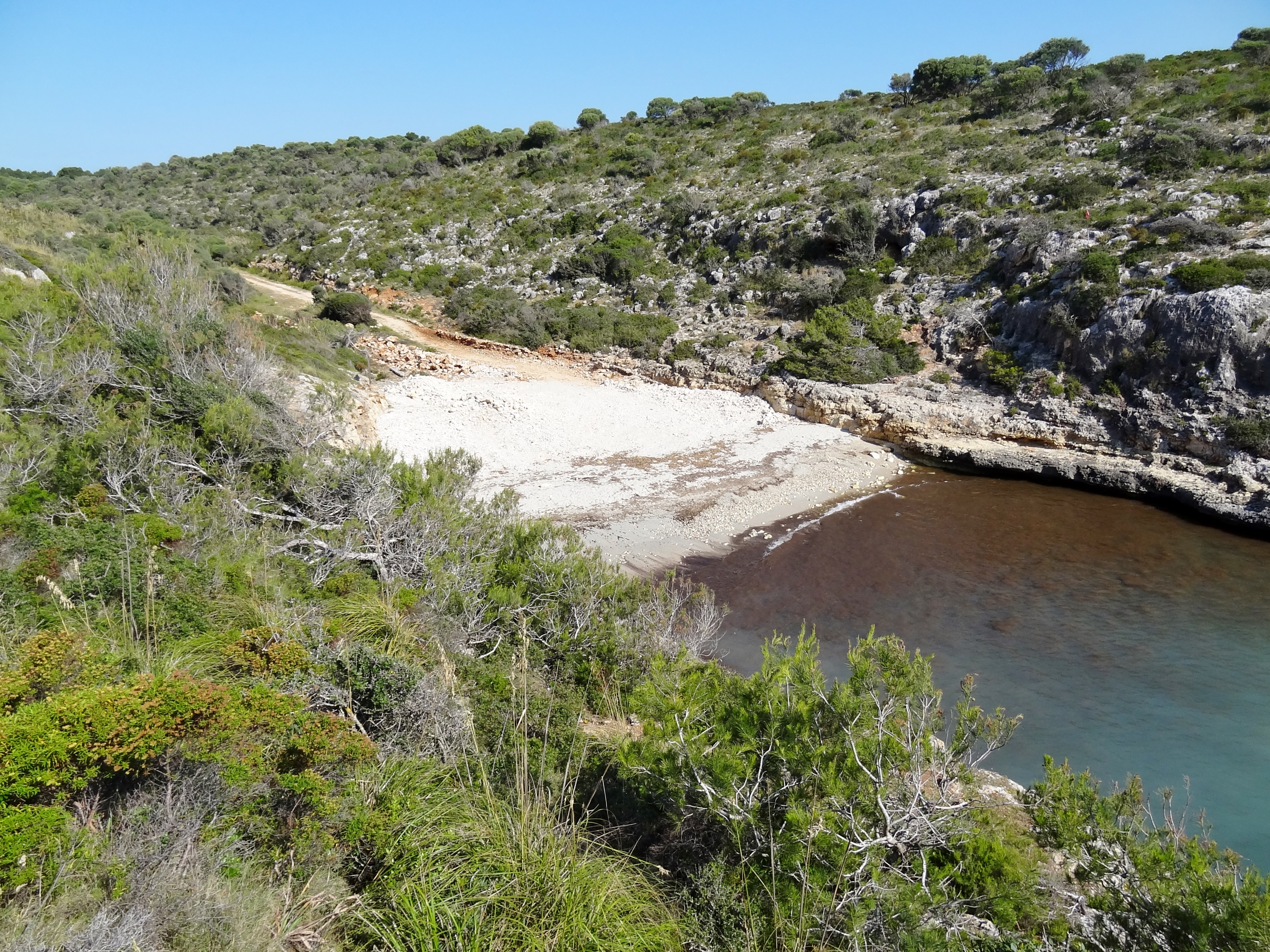 Cala Pilota, Bucht an der Küste der Gemeinde Manacor, Mallorca, Spanien